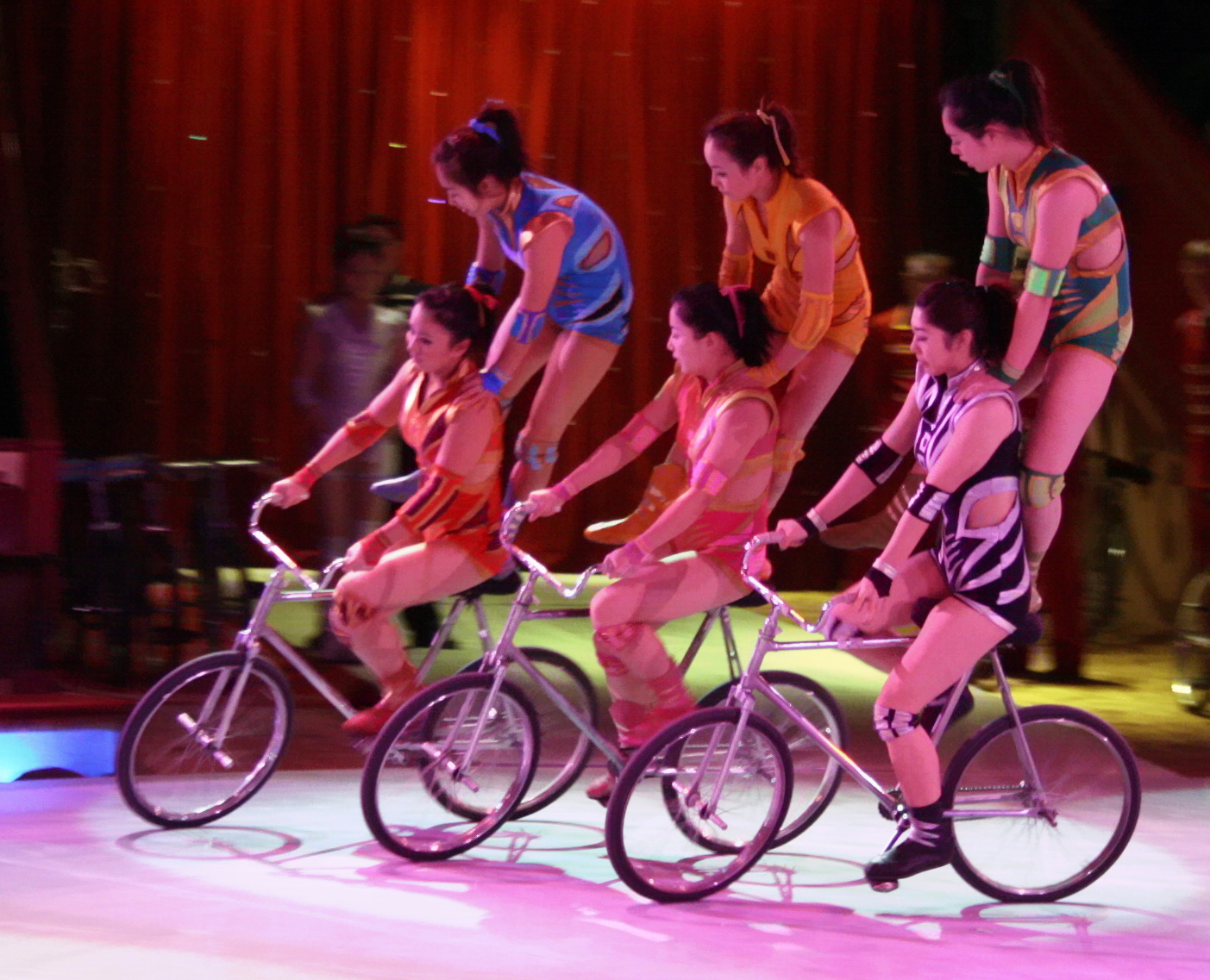 TRUPPE DALIAN Fahrradartisten vom chinesischen Staatszirkus.